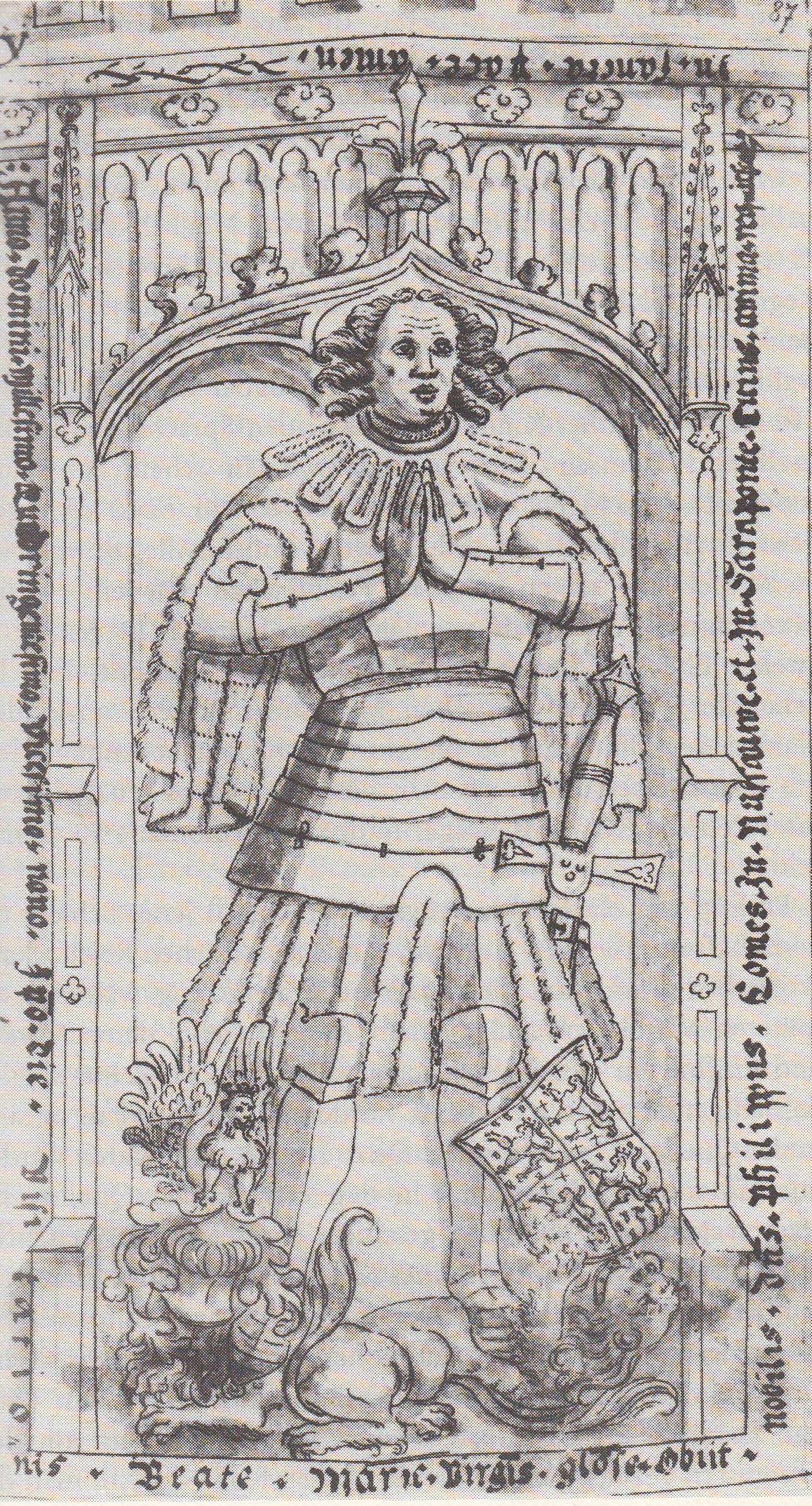 Philipp I. von Nassau-Saarbrücken: Zeichnung des Epitaphs aus dem Epitaphienbuch von Heinrich Dors, 1632. Hessisches Hauptstaatsarchiv Wiesbaden. Depositum SKH des Großherzogs von Luxemburg (Abt. 130 II, Nr. 22). Beschreibung: DI 51, Wiesbaden, Nr. 30† (Yvonne Monsees) in